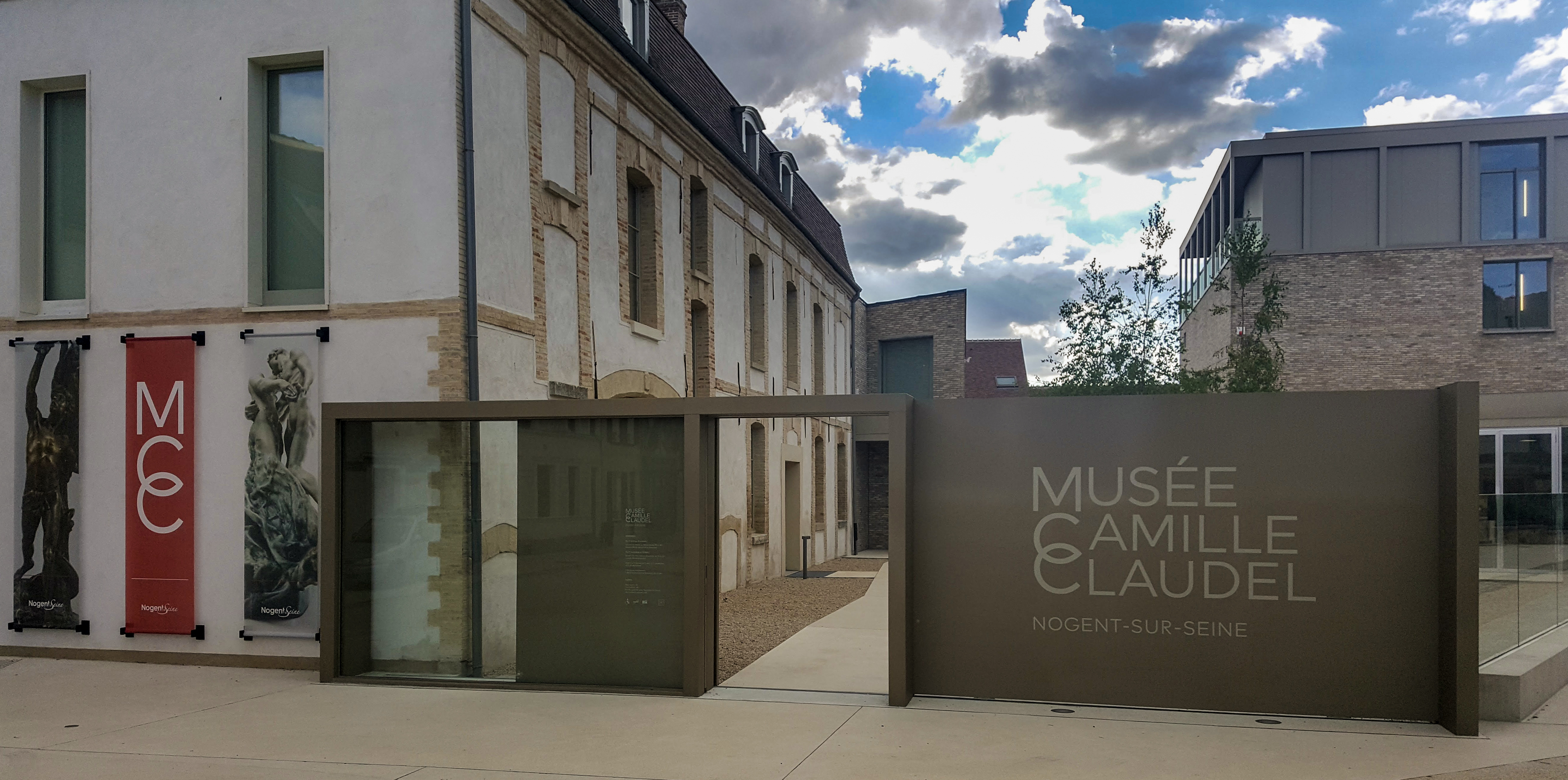 Camille Claudel Museum in Nogent-sur-Seine